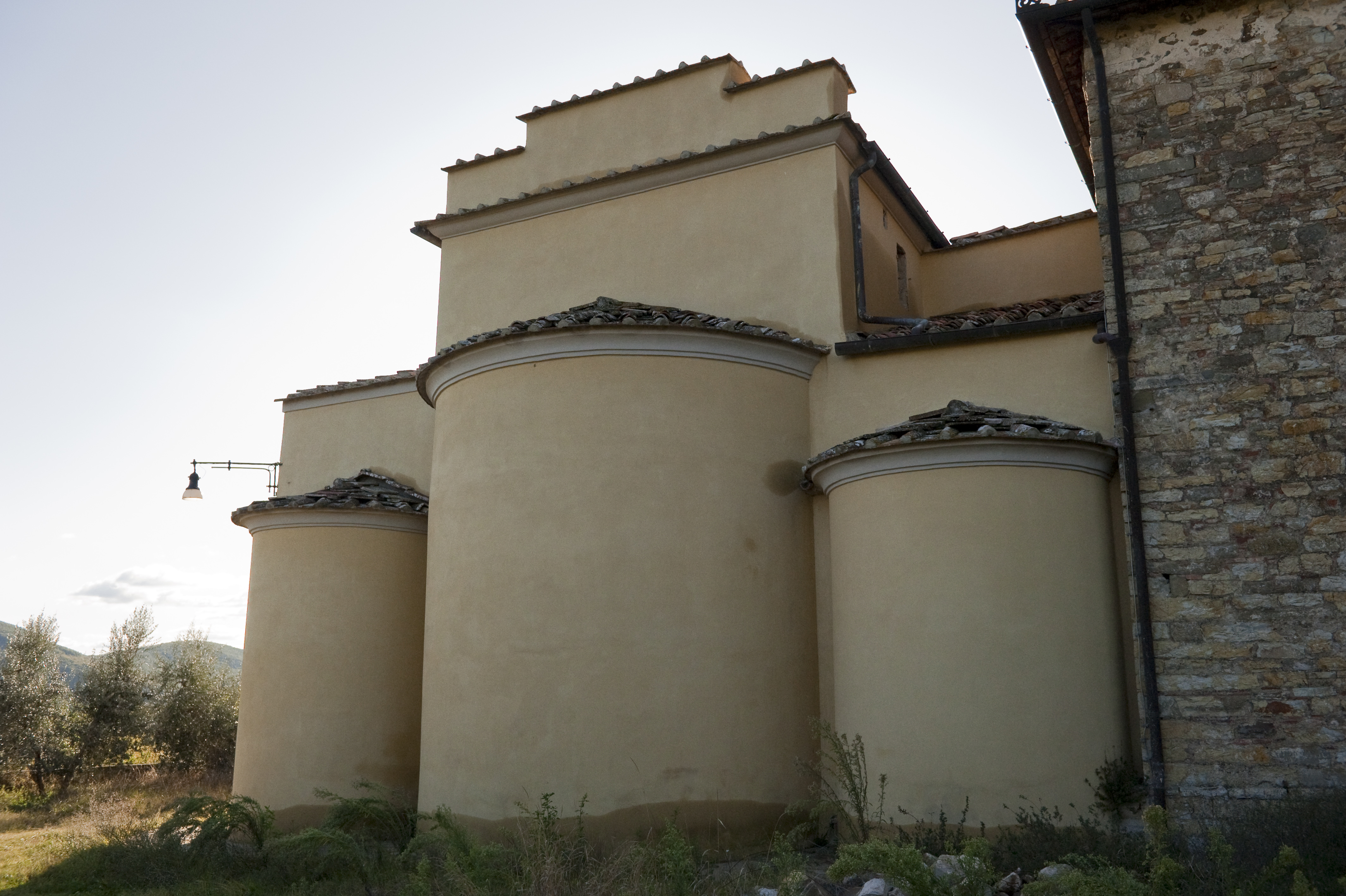 Abside della chiesa di Santa Maria Novella in Chianti (Radda in Chianti)